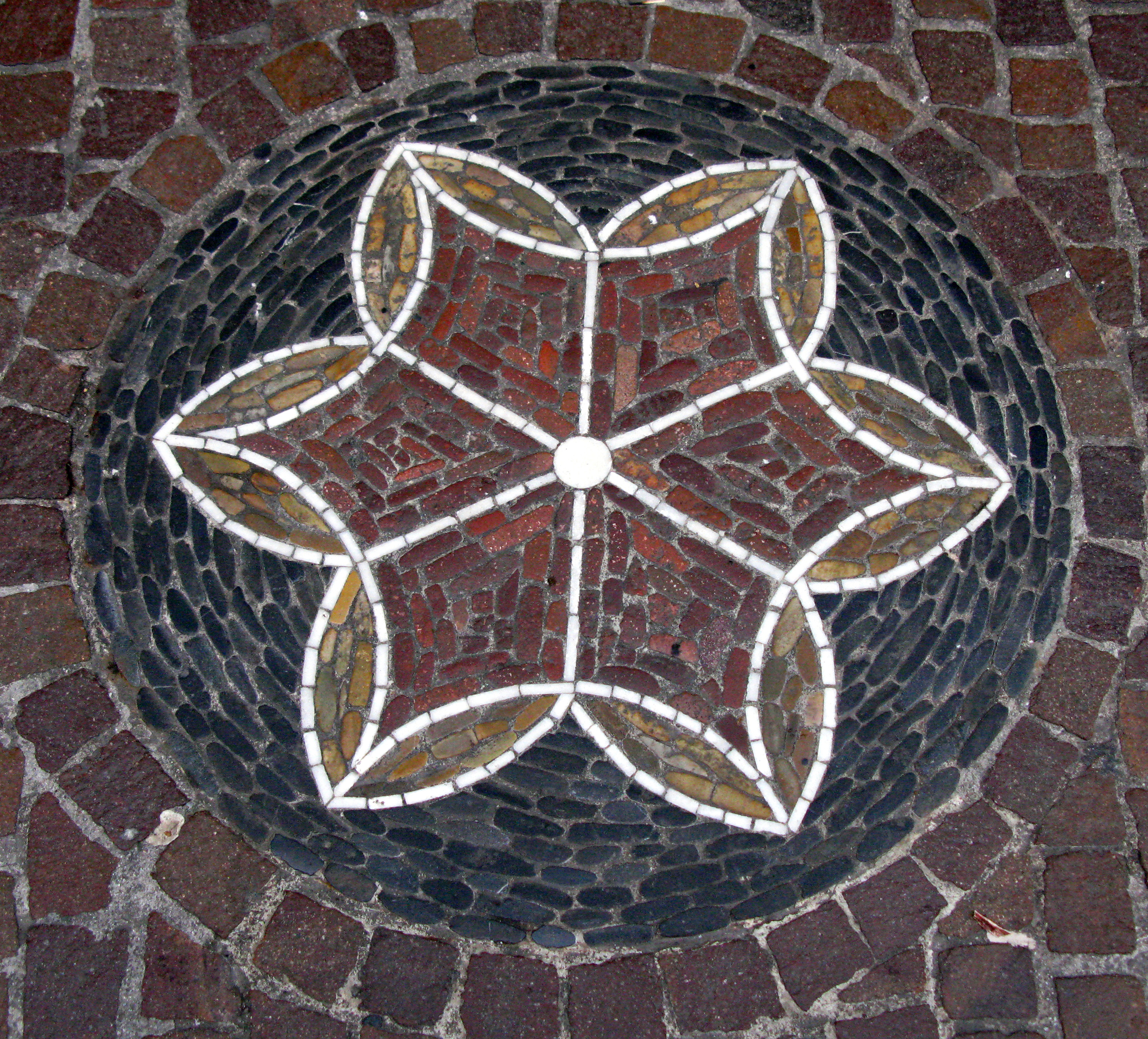 Mosaik in der Bertoldstraße